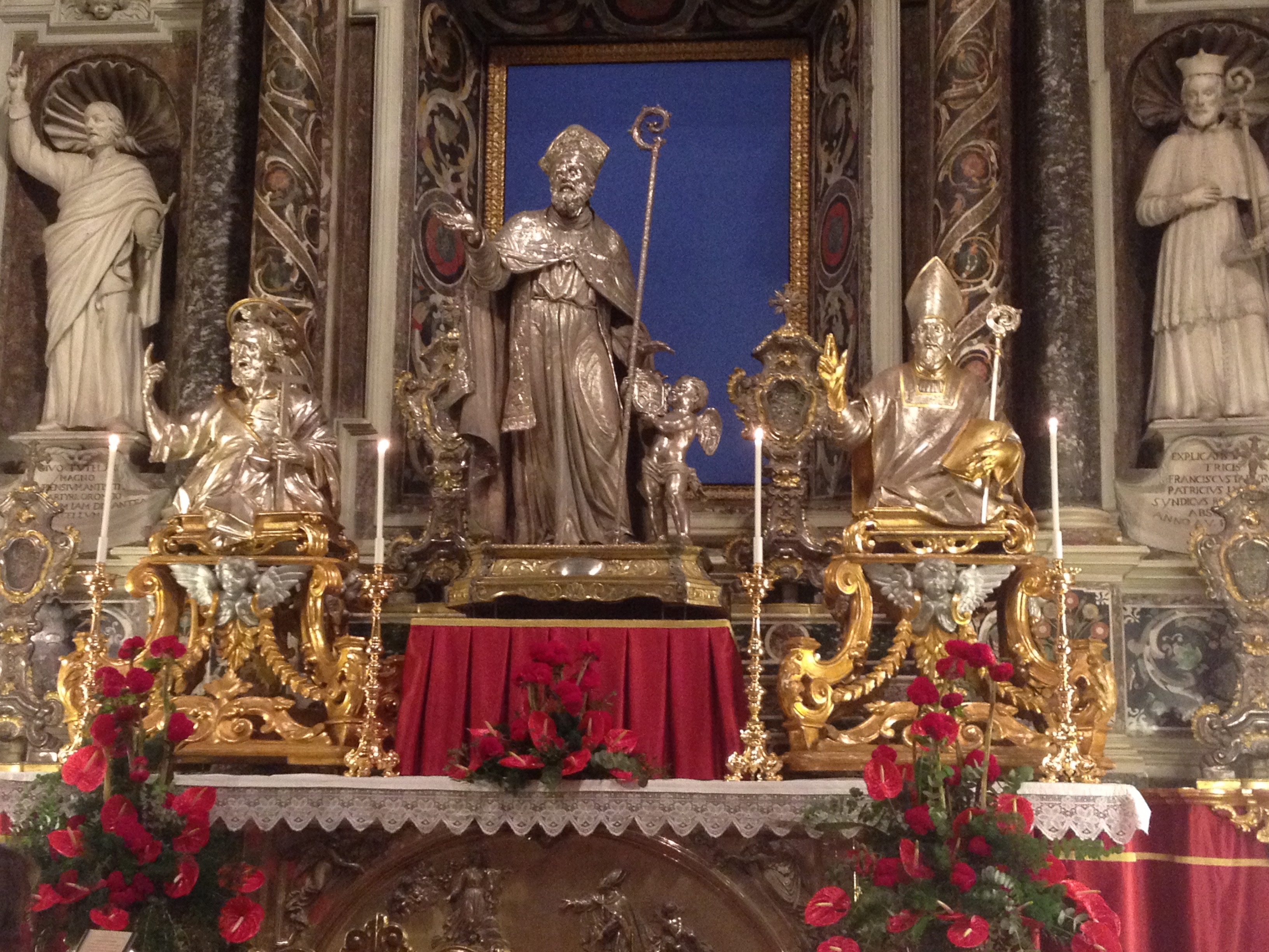 Le statue argentee dei Santi Oronzo, Giusto e Fortunato, intronizzati durante le festività patronali a Lecce.